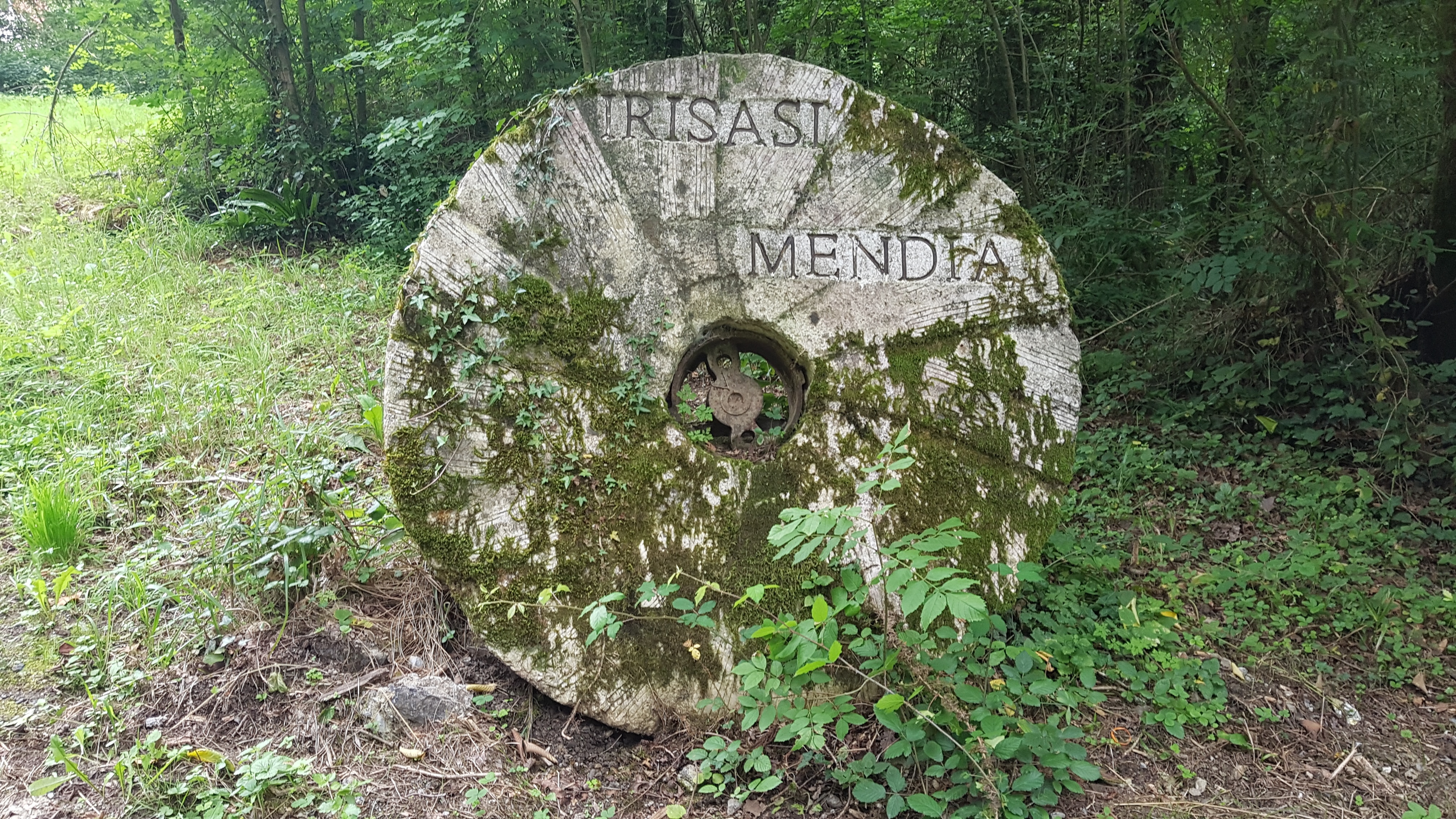 Irisasi mendia markatuta daukan errotarri bat. Andatza mendira doan pistan, Irisasi adingabeentzako zentrotik gertu.